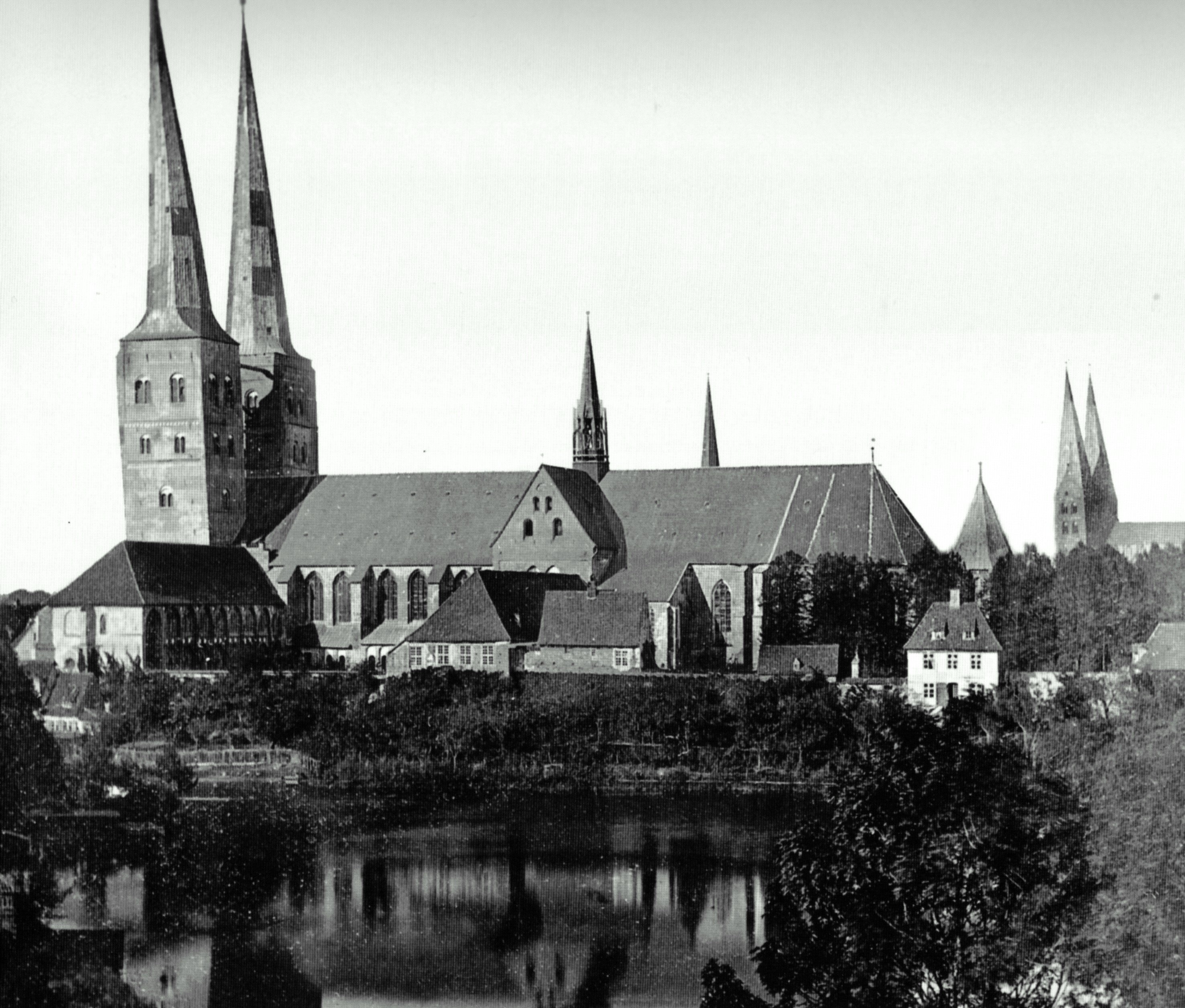 Der Lübecker Dom mit den Resten des vom 13. bis zum 15. Jahrhundert errichteten Domklosters (1889 größtenteils abgetragen zugunsten eines Museumsneubaus)